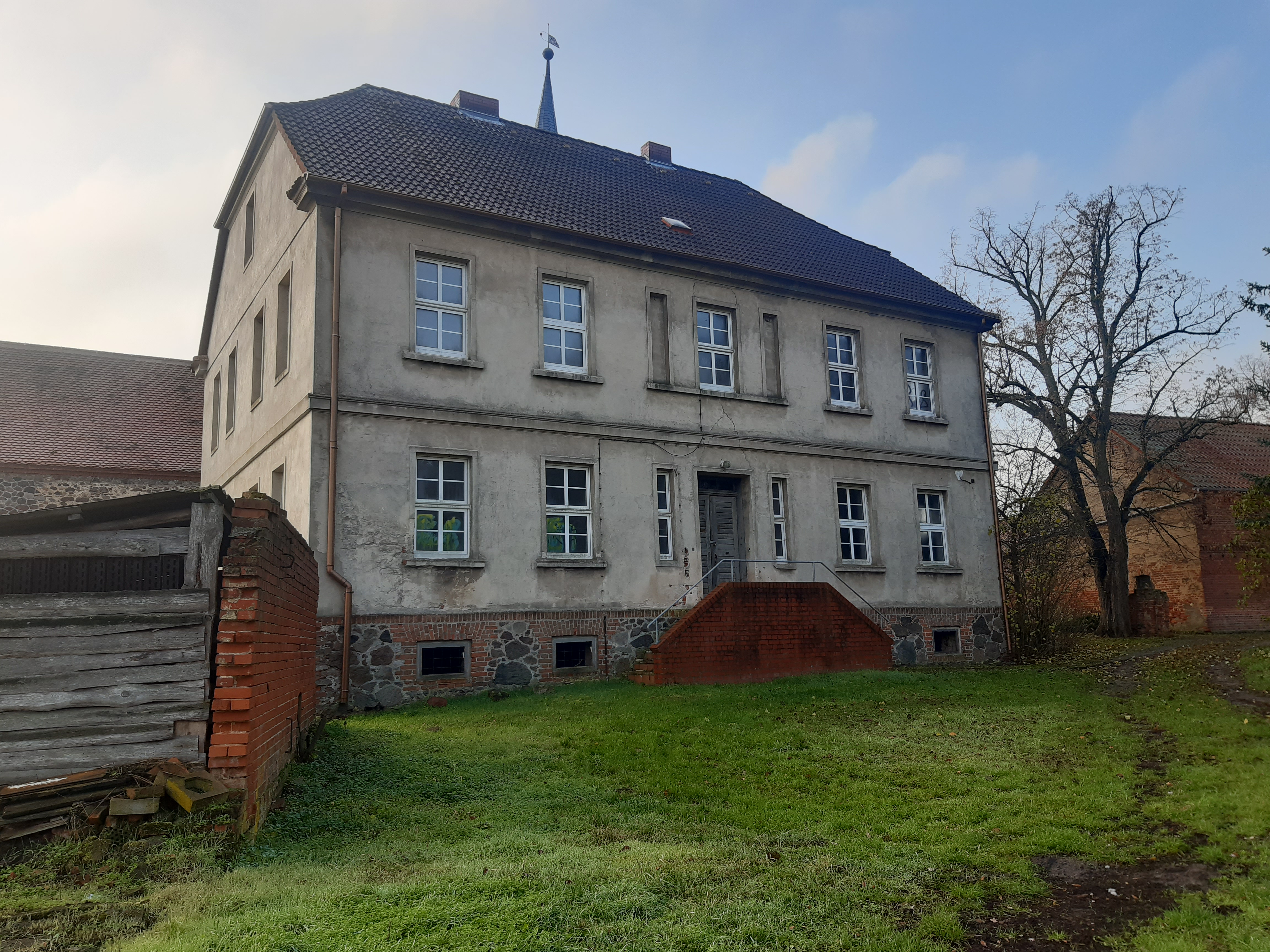 Pfarrhof